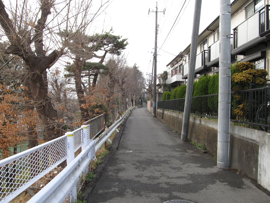 はけ（崖）の道